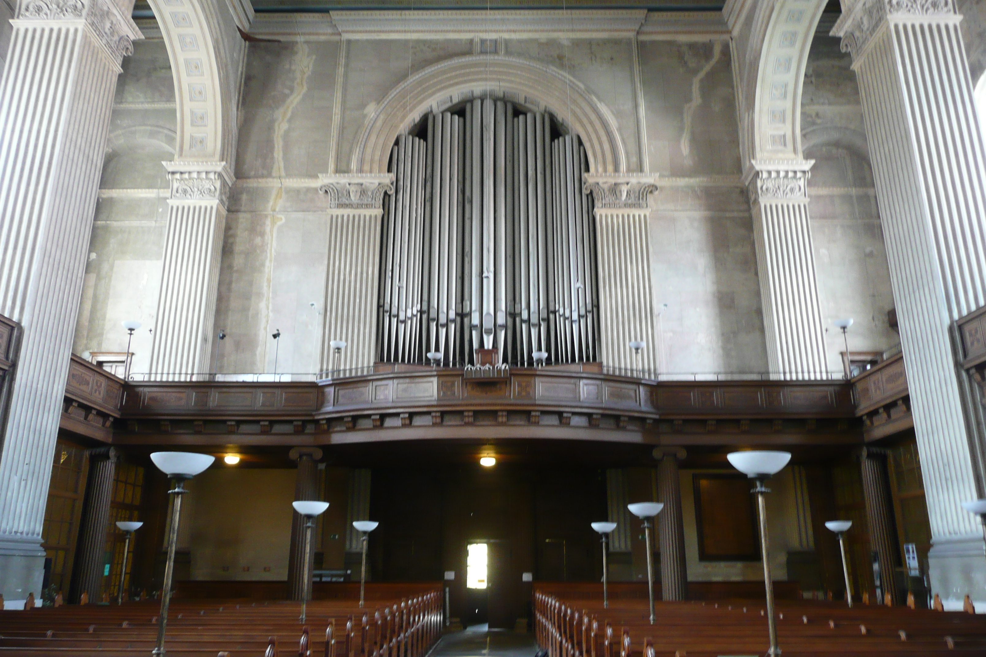 Johanniskirche in Zittau. Orgel